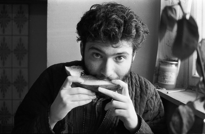 Pavel Pepperstein, peintre russe, à Moscou en 1990